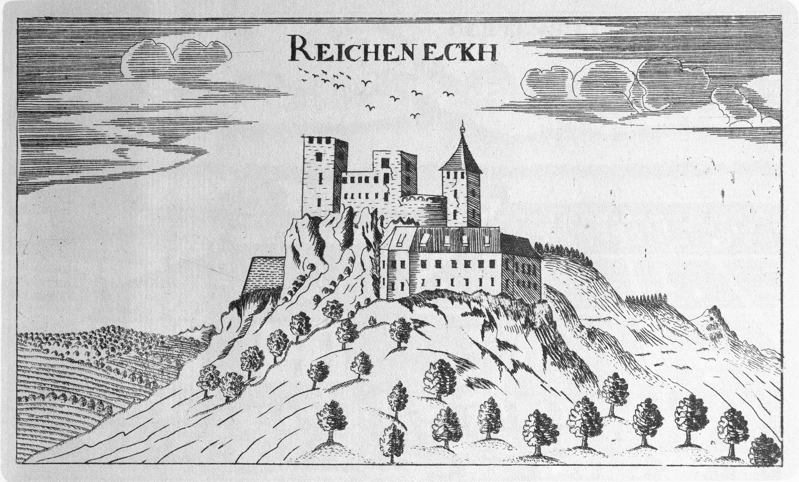 G. M. Vischers Käyserlichen Geographi, Topographia Ducatus Stiriae, Das ist: Eigentliche Delineation / und Abbildung aller Städte / Schlösser / Marcktfleck / Lustgärten / Probsteyen / Stiffter / Clöster und Kirchen / so es sich im Herzogthumb Steyrmarck befinden; Und anjetzo Umb einen billichen Preyß zu finden seynd Bey Johann Bitsch Universitäts Buchhandlern / Auff dem Juden=Platz bey der guldenen Saulen. Graz 1681 Die Nummerierung der Dateien folgt der alphabetischen Reihung der Ortsnamen und entspricht nicht dem Vischer-Register